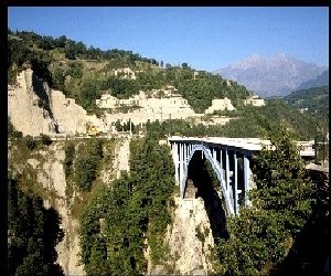 Description: Pont de Ponsonnas pres de Grenoble en Isere France 1° centre d'europe de saut en elastique / europe's premier bungee-jump center Source: oeuvre personnelle Date: 2005 Author: vertige aventures